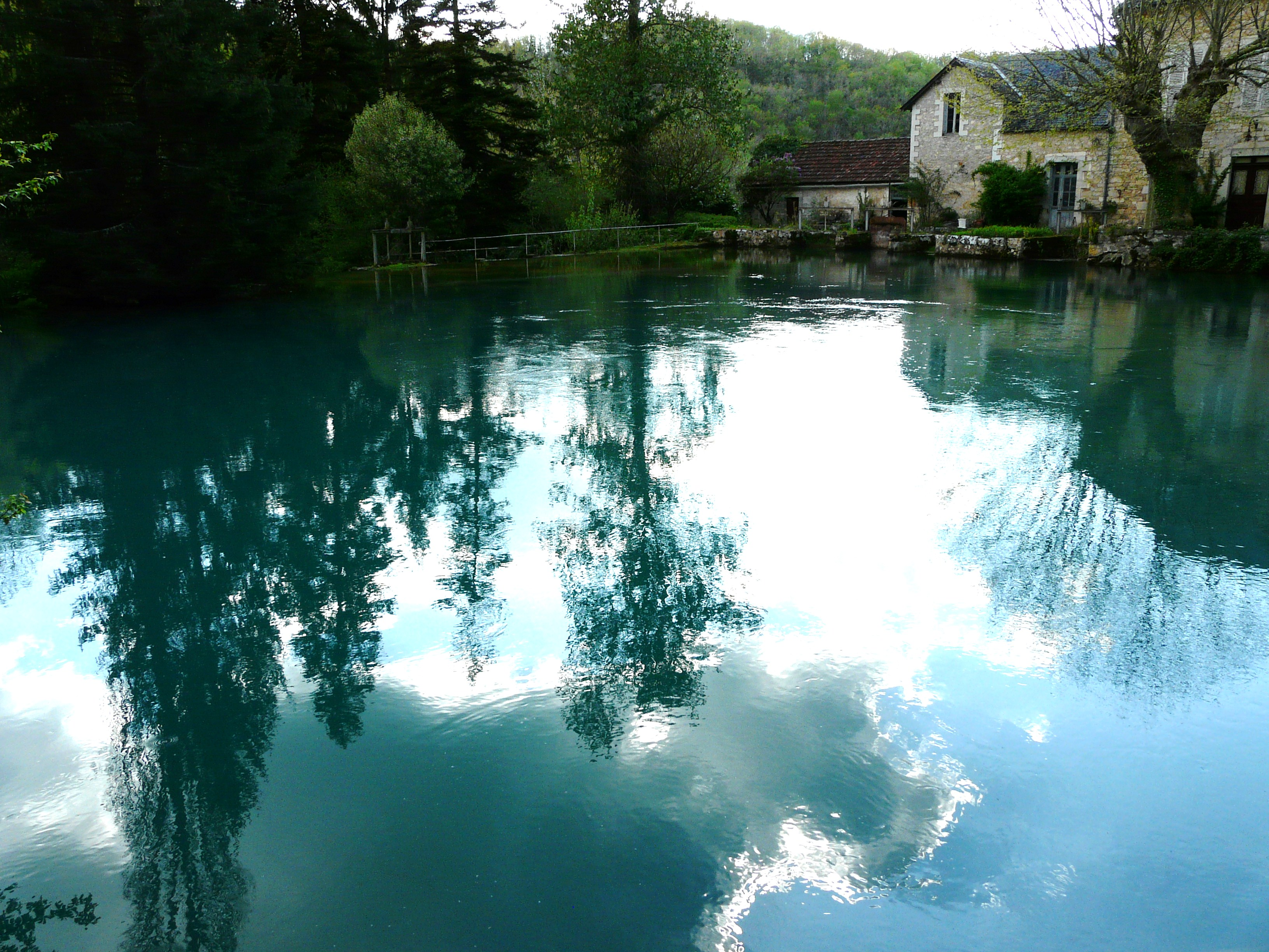 La Doux de Coly (résurgence du Coly) au moulin de Ladoux, La Cassagne, Dordogne, France